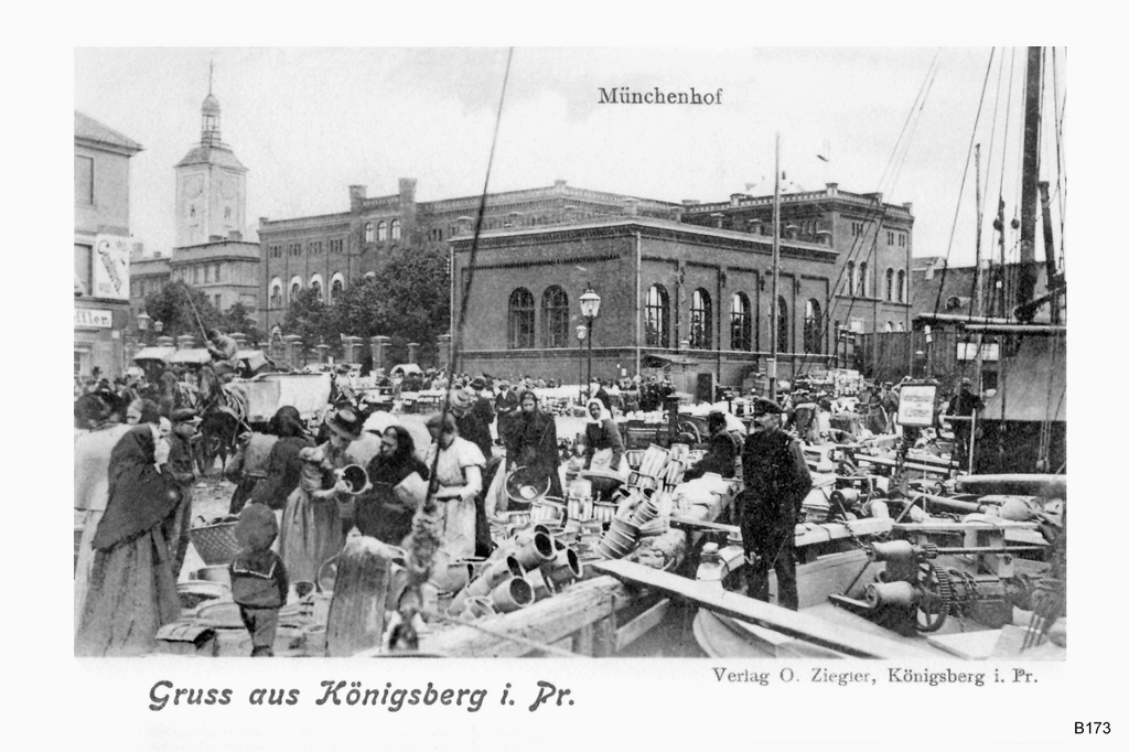 Königsberg